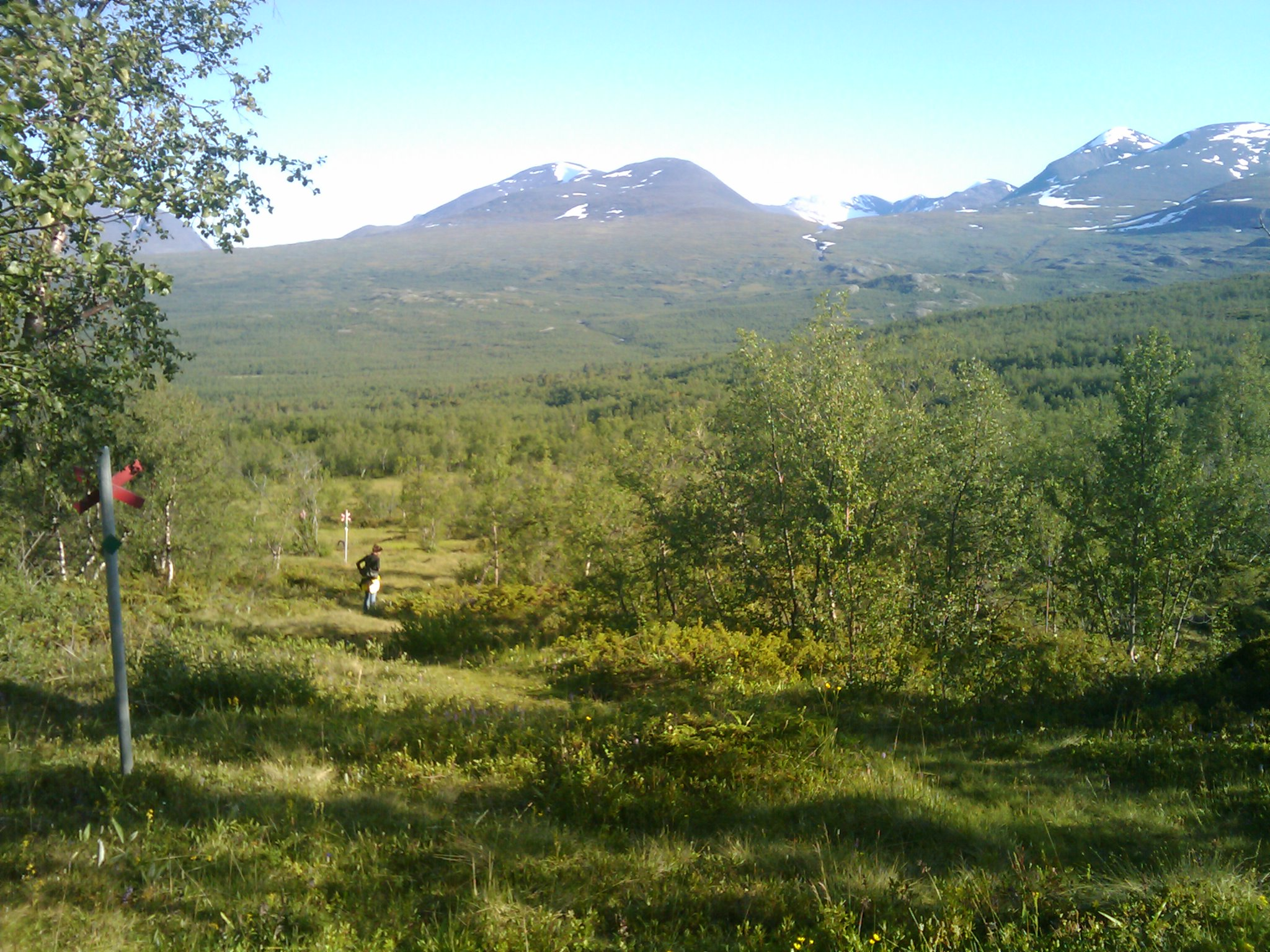 Birch forest in Abisko